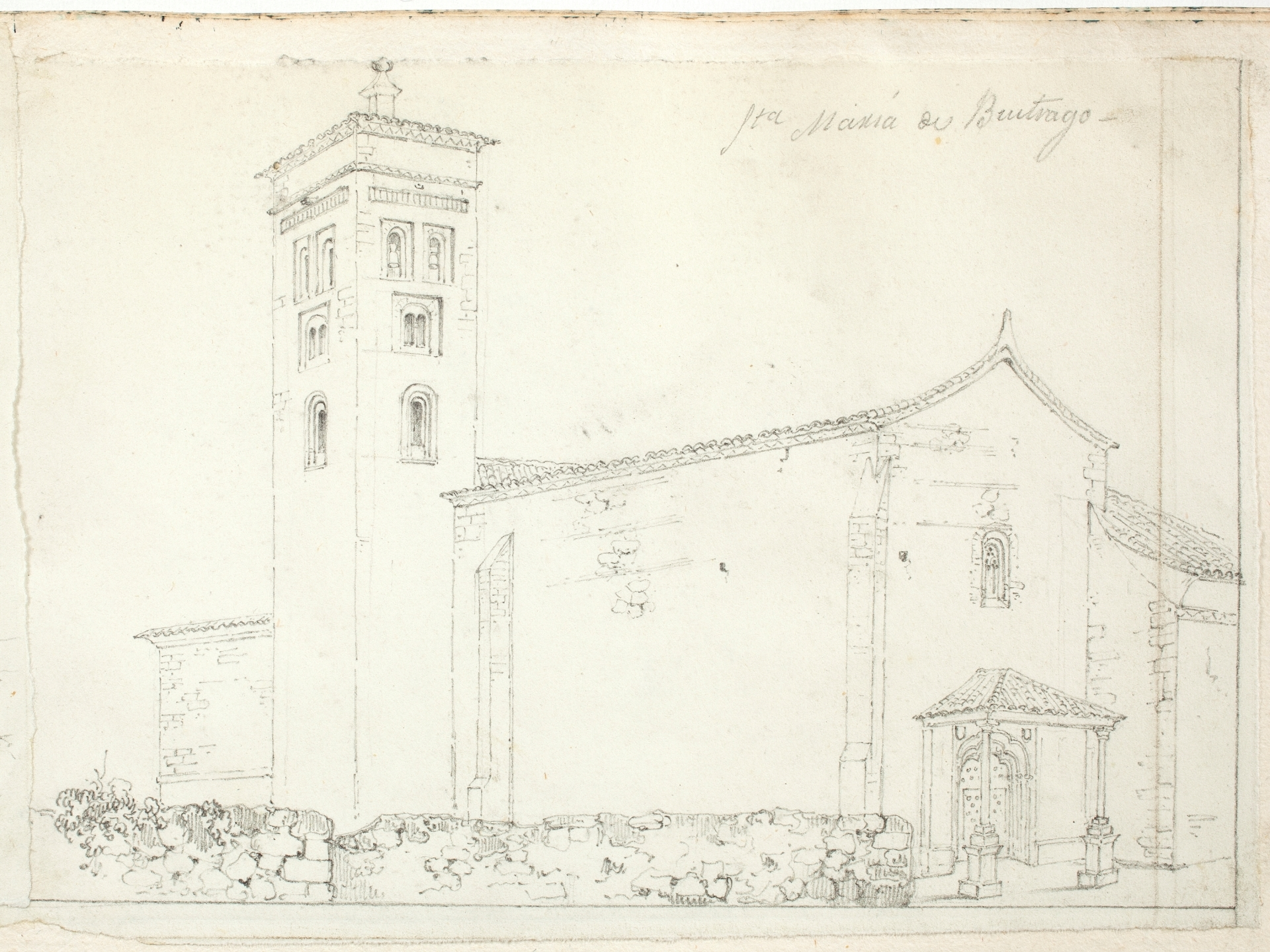 Iglesia de San Juan Bautista de Buitrago de Lozoya, Madrid (1840-1873). Lápiz compuesto sobre papel avitelado. Museo del Prado, Madrid, España